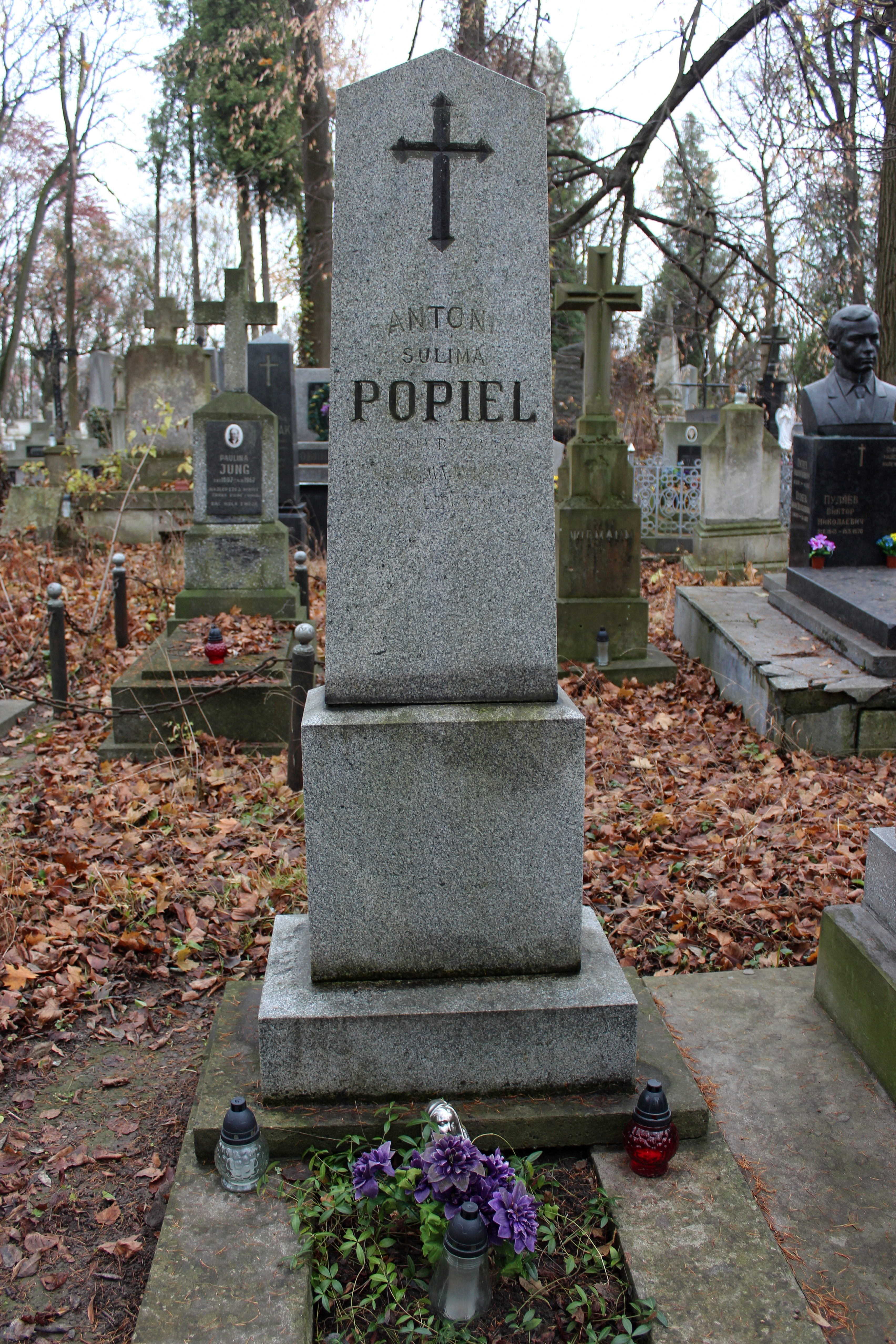 Пам'ятник на могилі А.Попеля. Личаківський цвинтар , поле № 57.